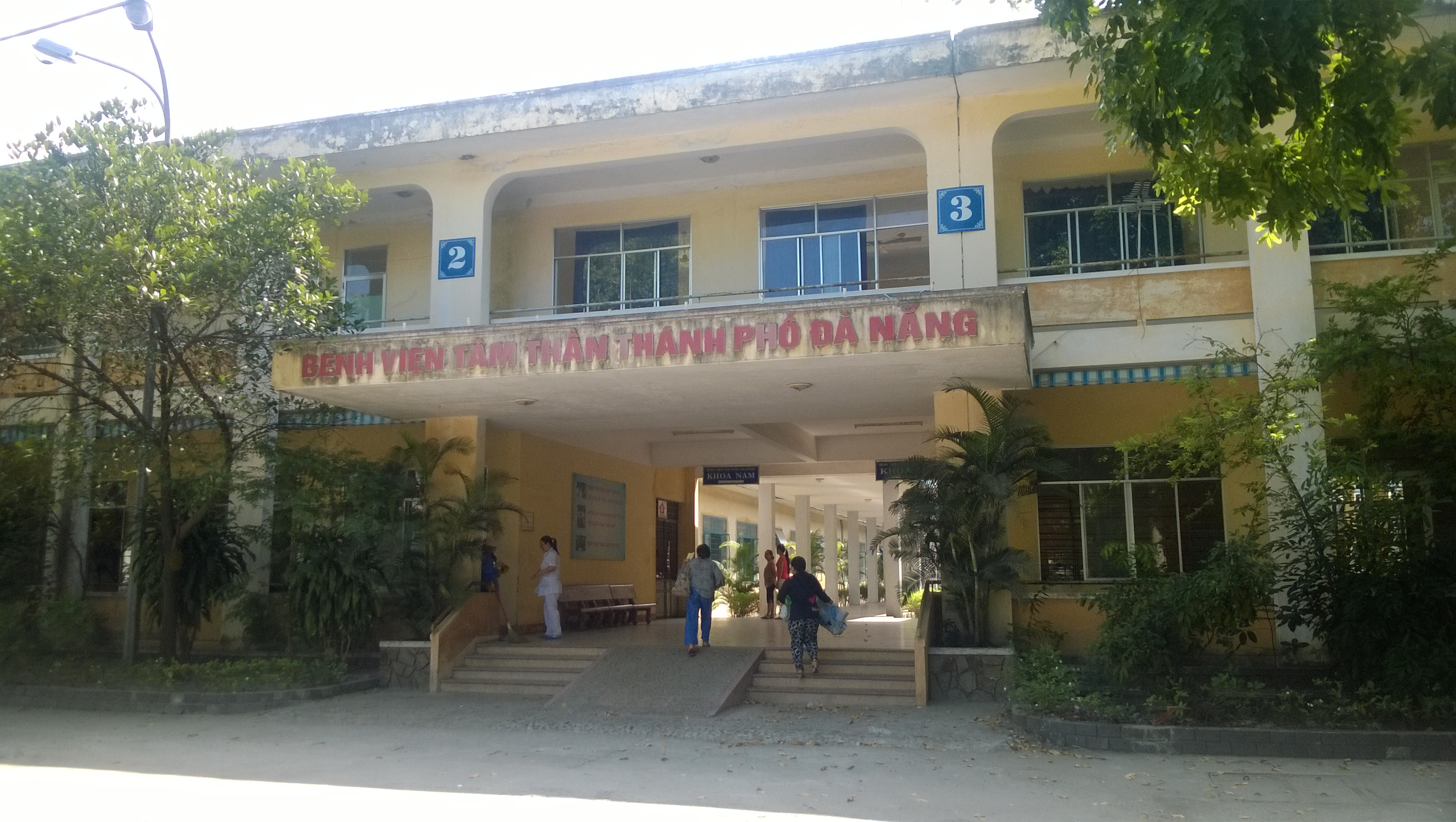 Bệnh viện Tâm thần Đà Nẵng